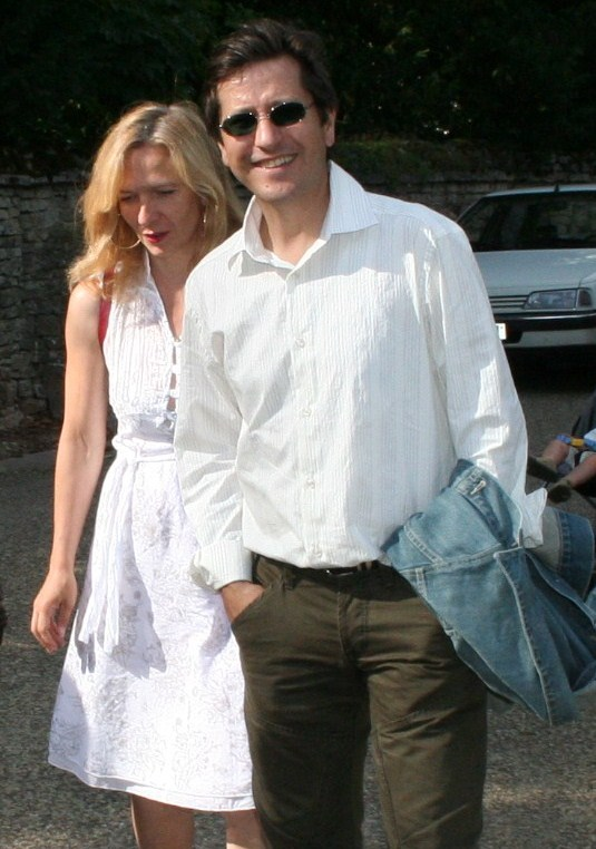 Michel Verjux et Isabelle Lartault.